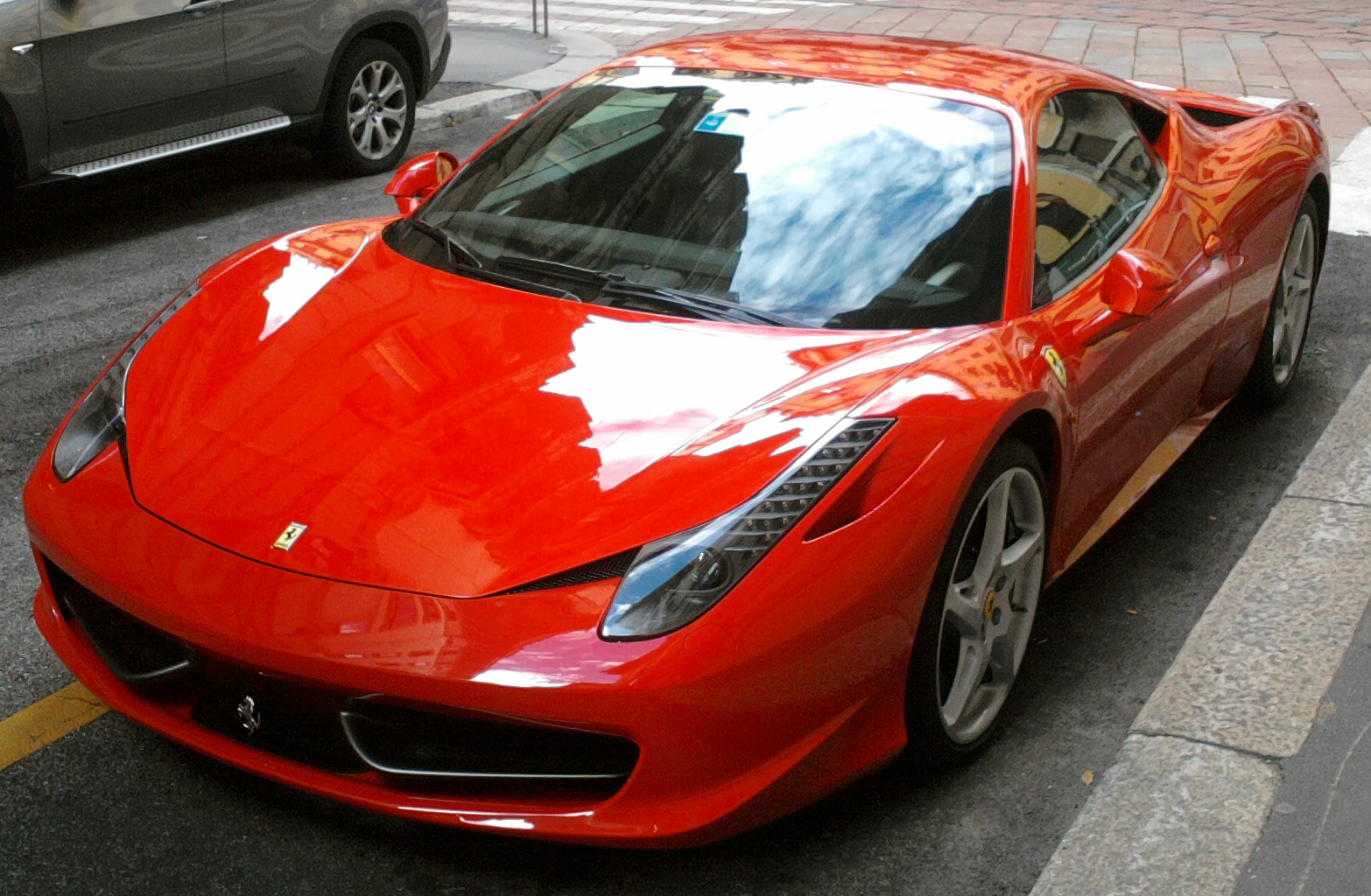 Una Ferrari 458 Italia rossa fotografata nel settembre 2010 a Milano